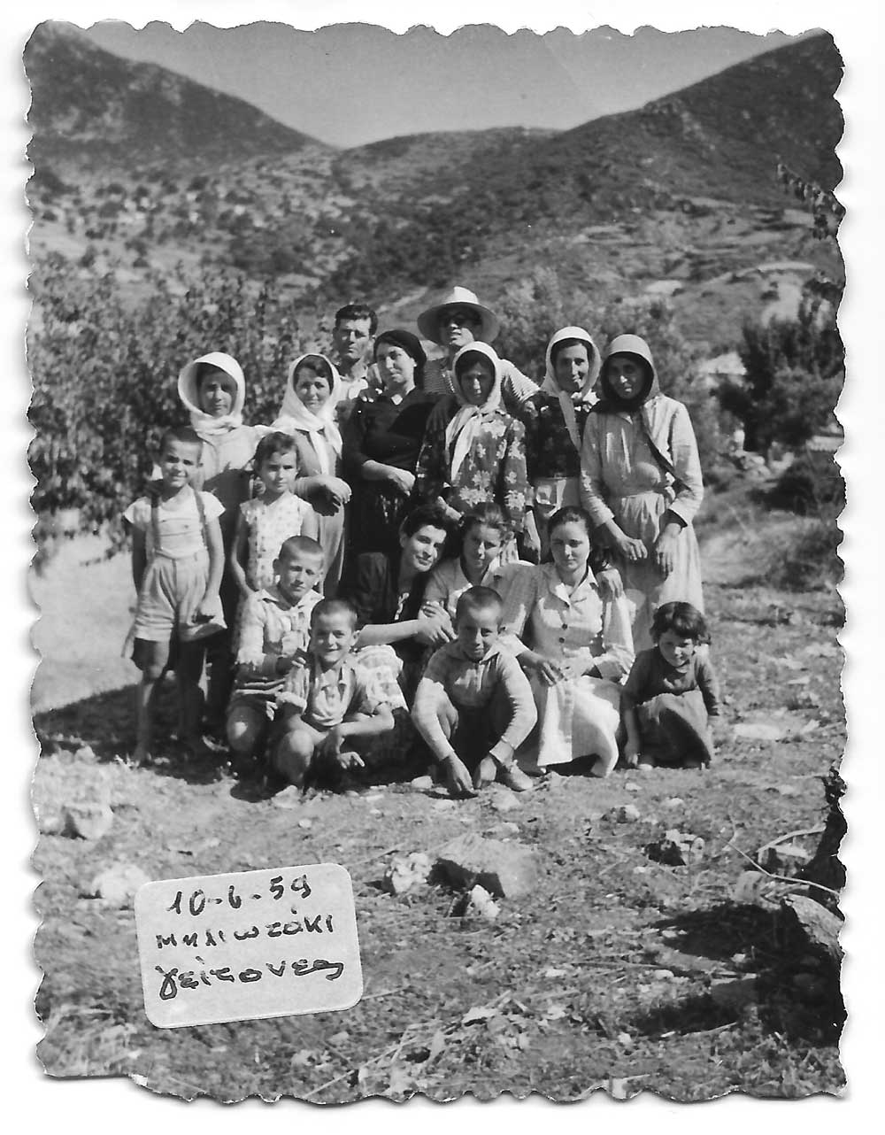 Γειτονιά παλιού χωριού.